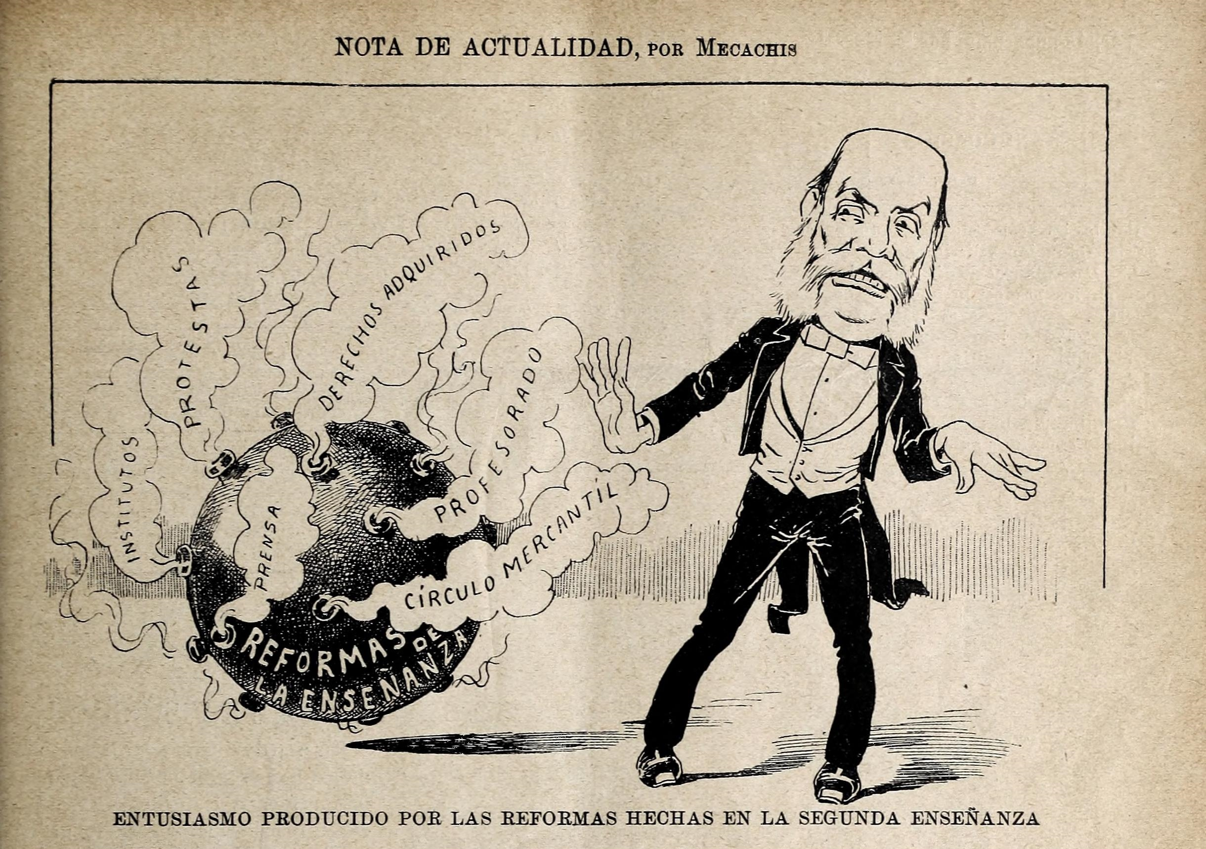 Nota de actualidad. Entusiasmo creado por las reformas hecha en la segunda enseñanza